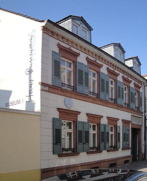 Purrmann-Haus, Kleine Greifengasse 14 Speyer